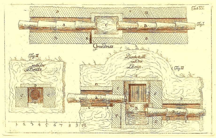 Die Wasserleitung von HD-Rohrbach im Querschnitt, Grundriss, Schacht incl. Deichelröhre, Kontrollschacht und Erdwall